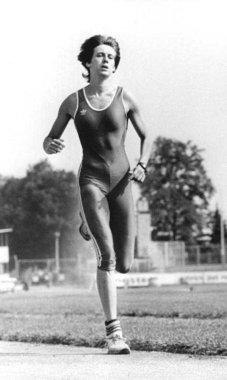 Sabine Busch ADN-ZB Hirndorf 3.8.88 Erfurt: Olympia-Kandidatin Sabine Busch Die 25jährige DDR-Meisterin 1988 über 400 m Hürden, Sabine Busch (SC Turbine Erfurt), im fleißigen Training für das große Ziel: Olympiateilnahme. Die Diplom-Sportlehrerin wurde am 21.11.1962 in Erfurt geboren, ist 1,77 m groß und 64 kg schwer. Siehe auch Motive 19 bis 21N.